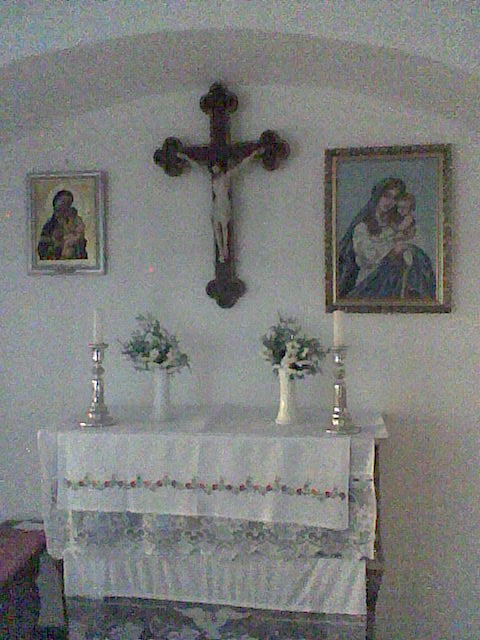 A tiszasülyi Szent László-templom